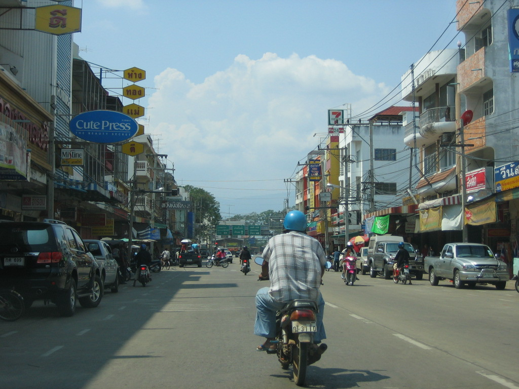 Straßenszene in Phetchabun